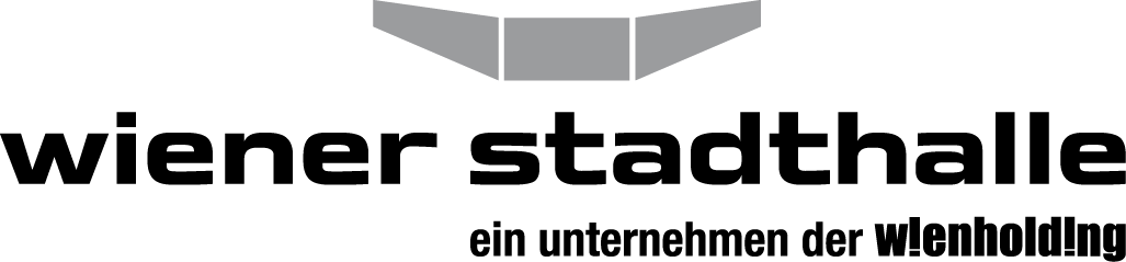 Stadthalle Wien Logo